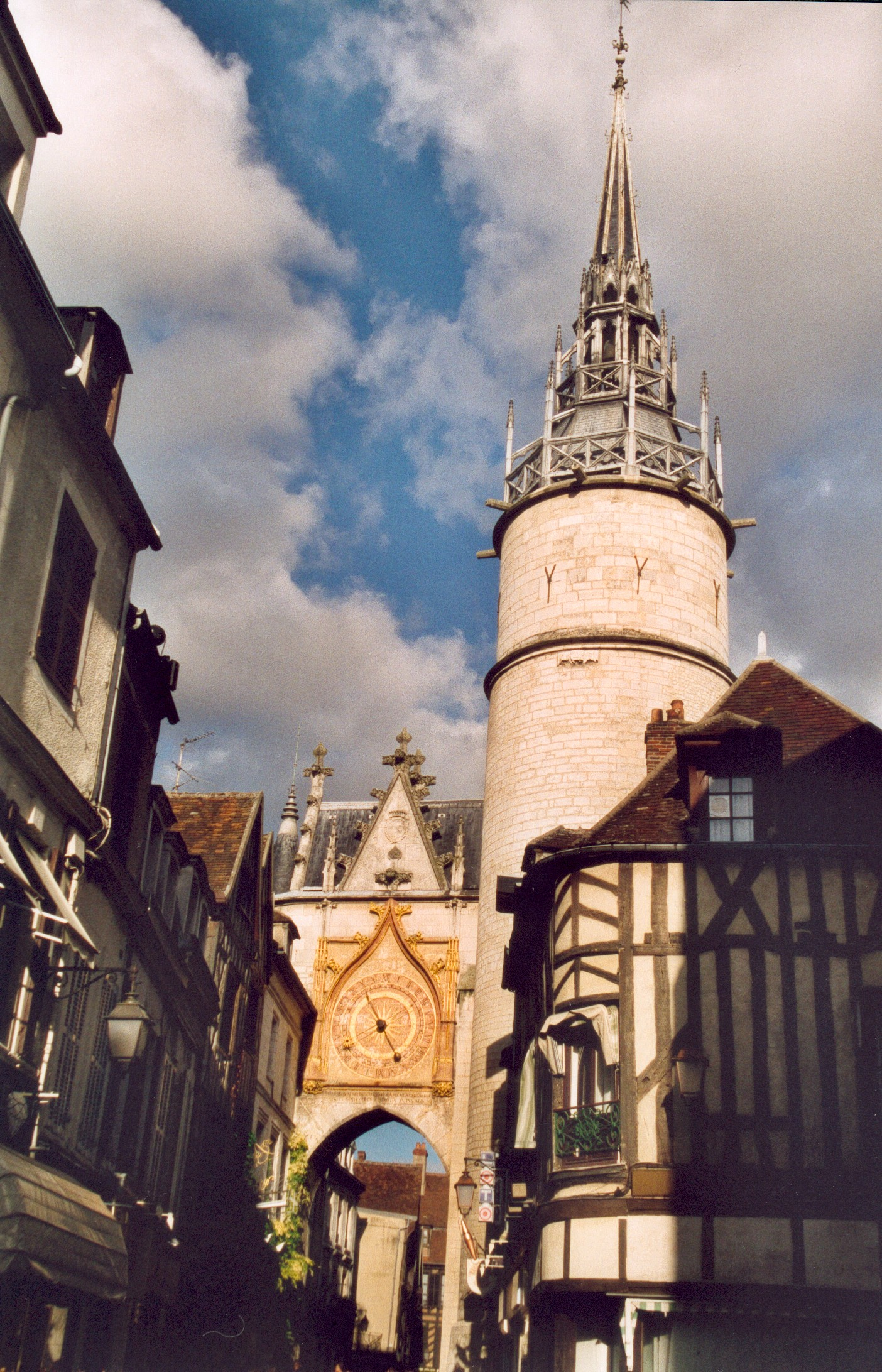 France Yonne Auxerre Tour de l'horloge Photographie prise par GIRAUD Patrick